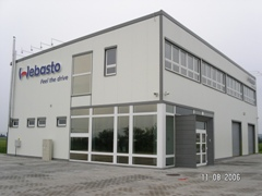 Sídlo Webasto Product Slovakia, s.r.o.